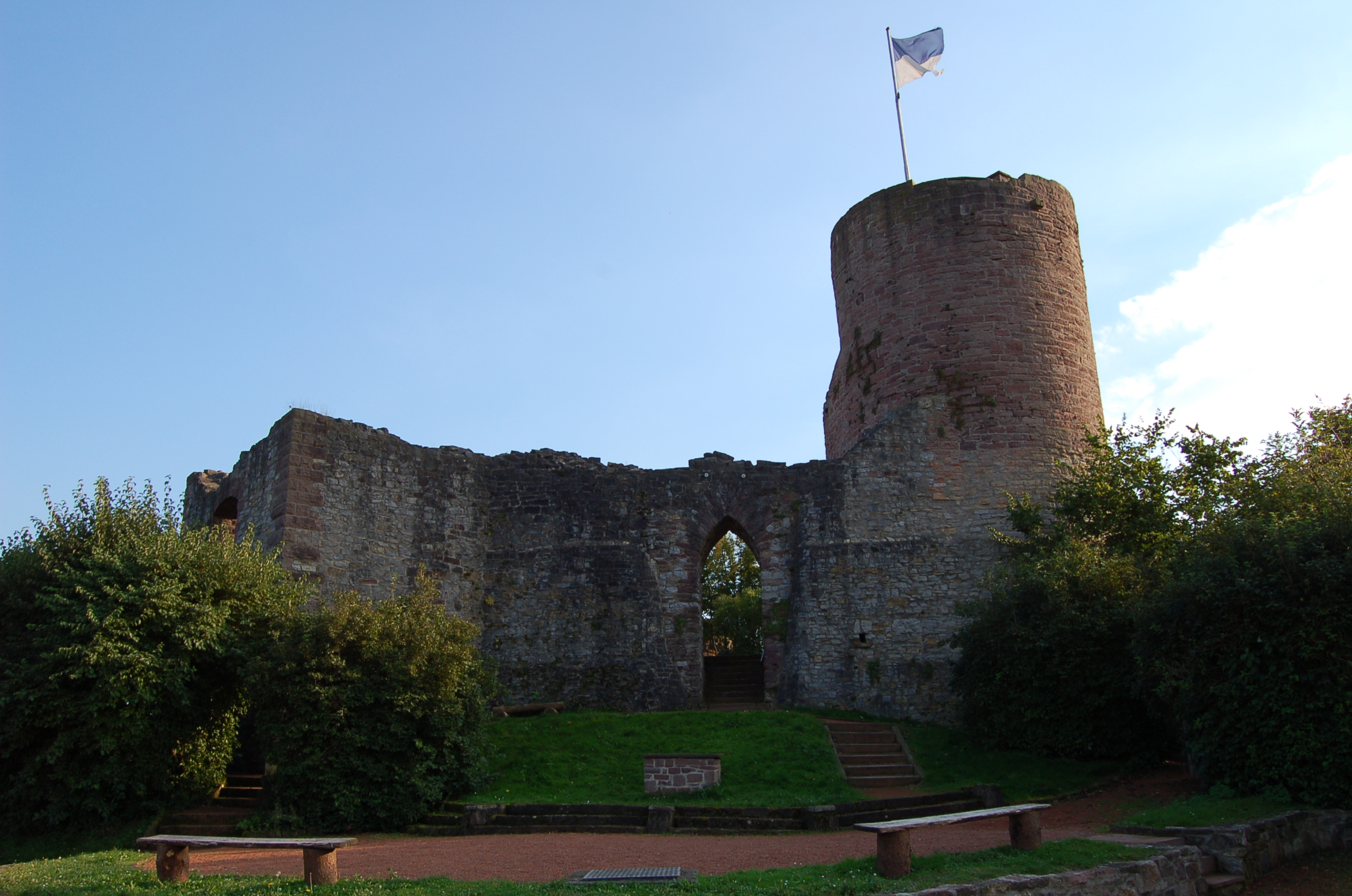 Burgruine Polle (Oberburg)